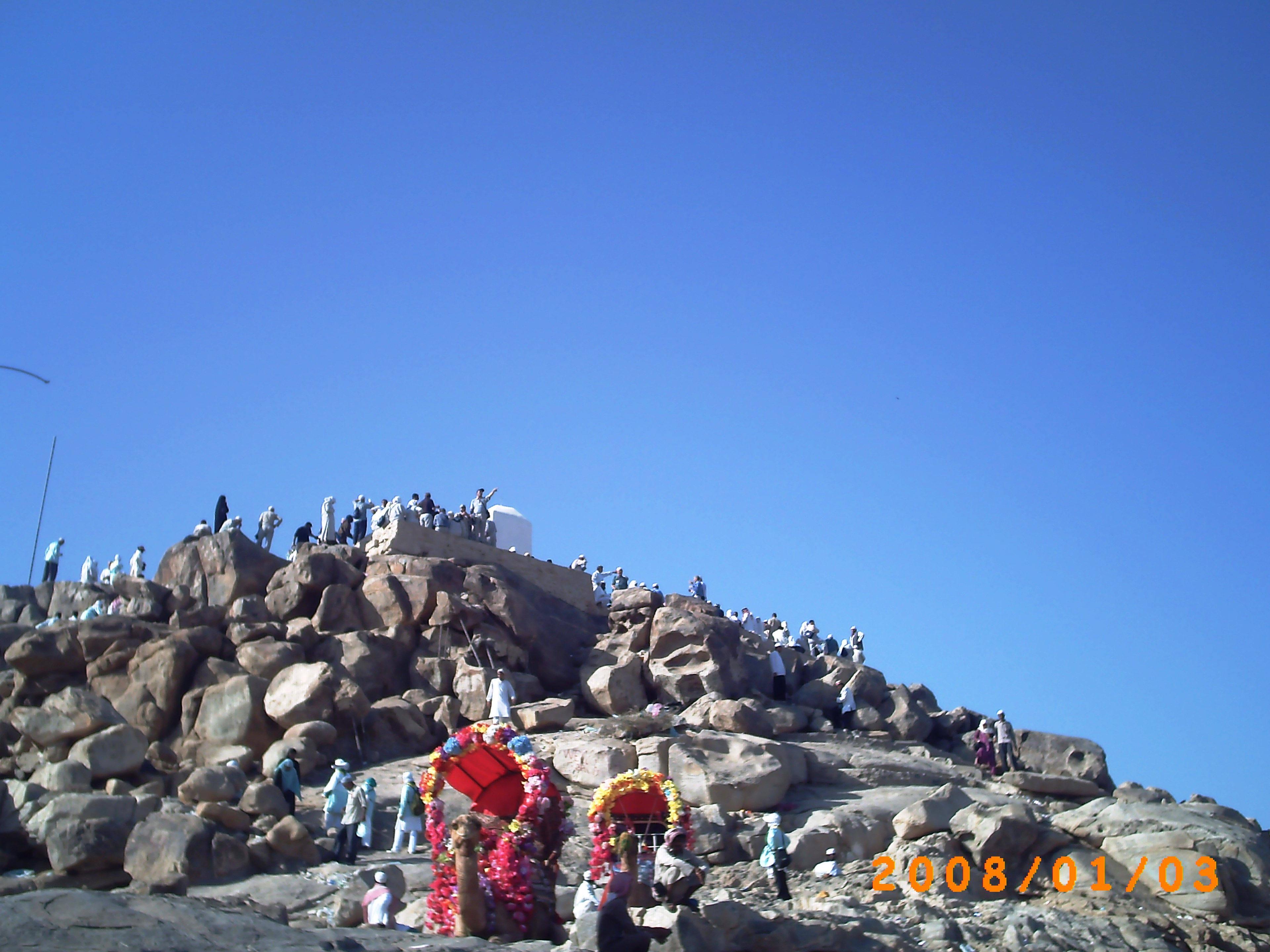 Jabal Rahmat 2008